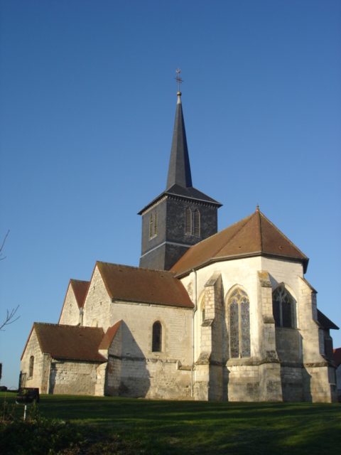 Eglise de Clamanges (Marne - France)